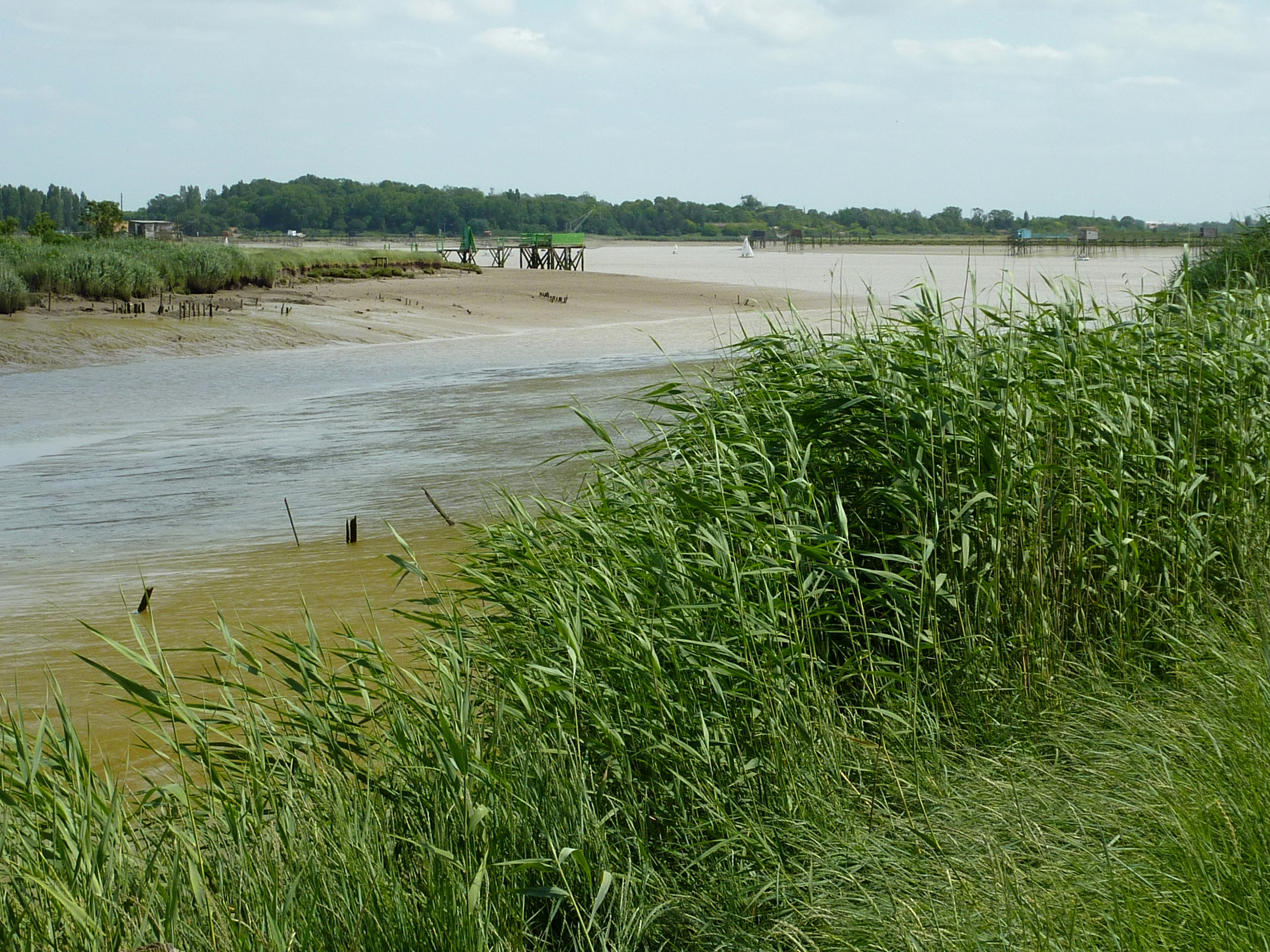 Canal de Charras à sa jonction avec la Charente - Saint-Laurent-de-la-Prée Charente Maritime France